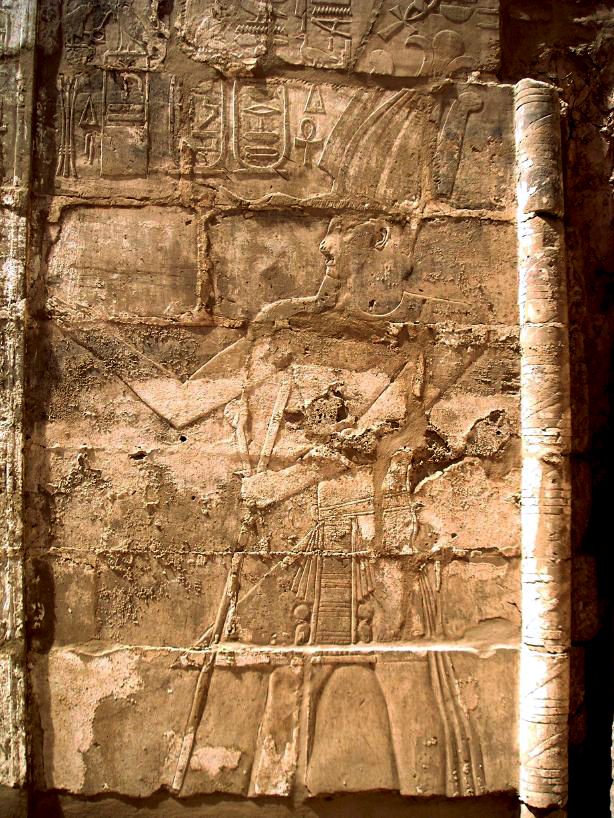 Relief représentant le pharaon Takélot III - Temple d'Osiris Heka-Djet à Karnak - XXIIIe dynastie égyptienne